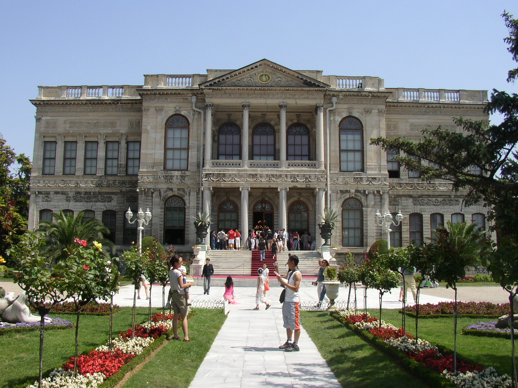 Ingresso del palazzo Dolmabahce, ad Istanbul Immagine realizzata da pnc_net